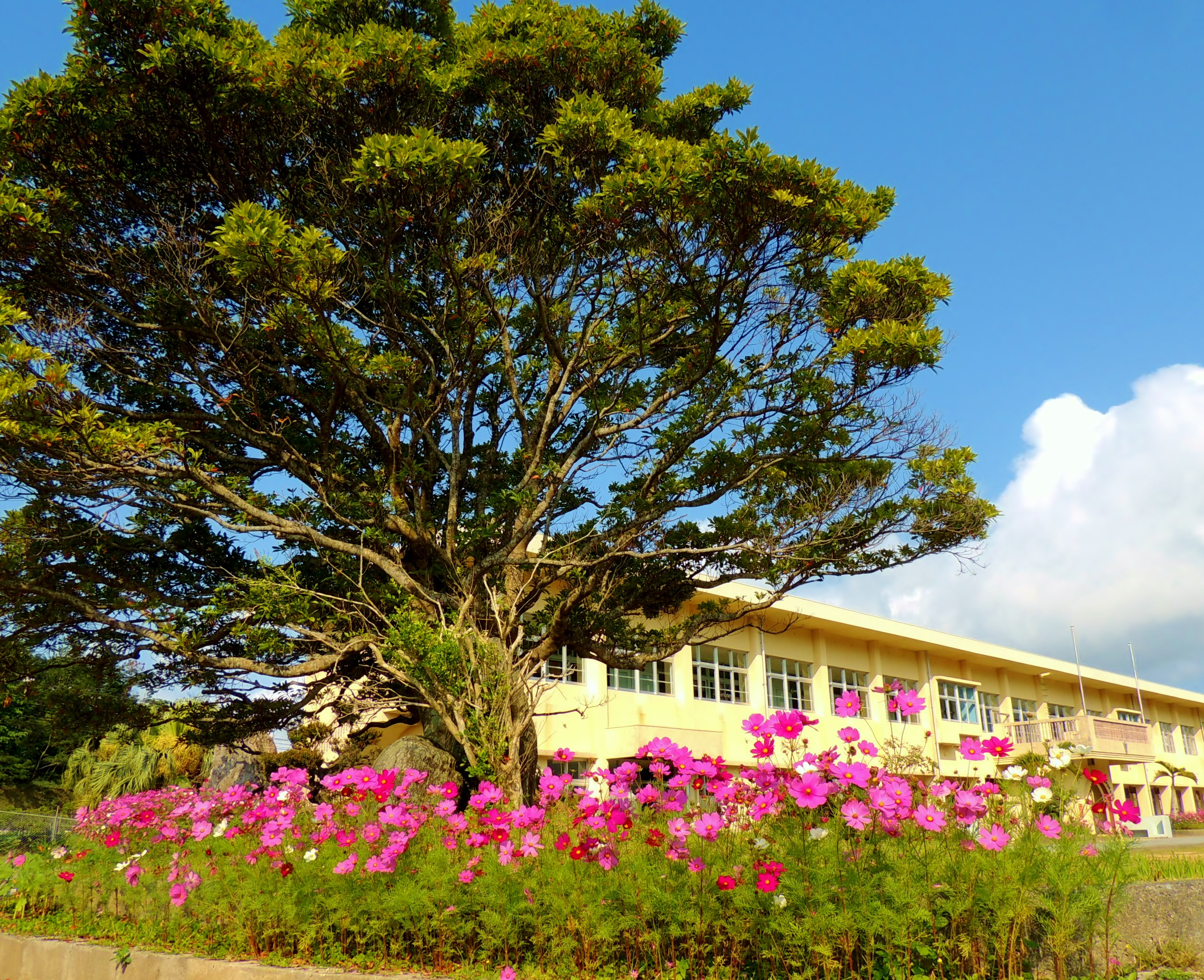 広域通信制・単位制のヒューマンキャンパス高等学校の名護本校校舎です。